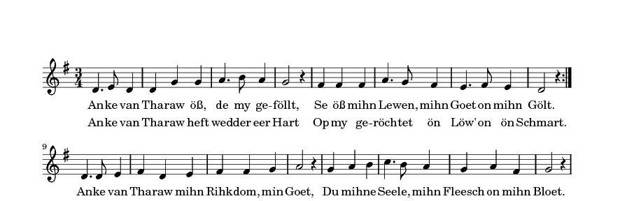 folk song